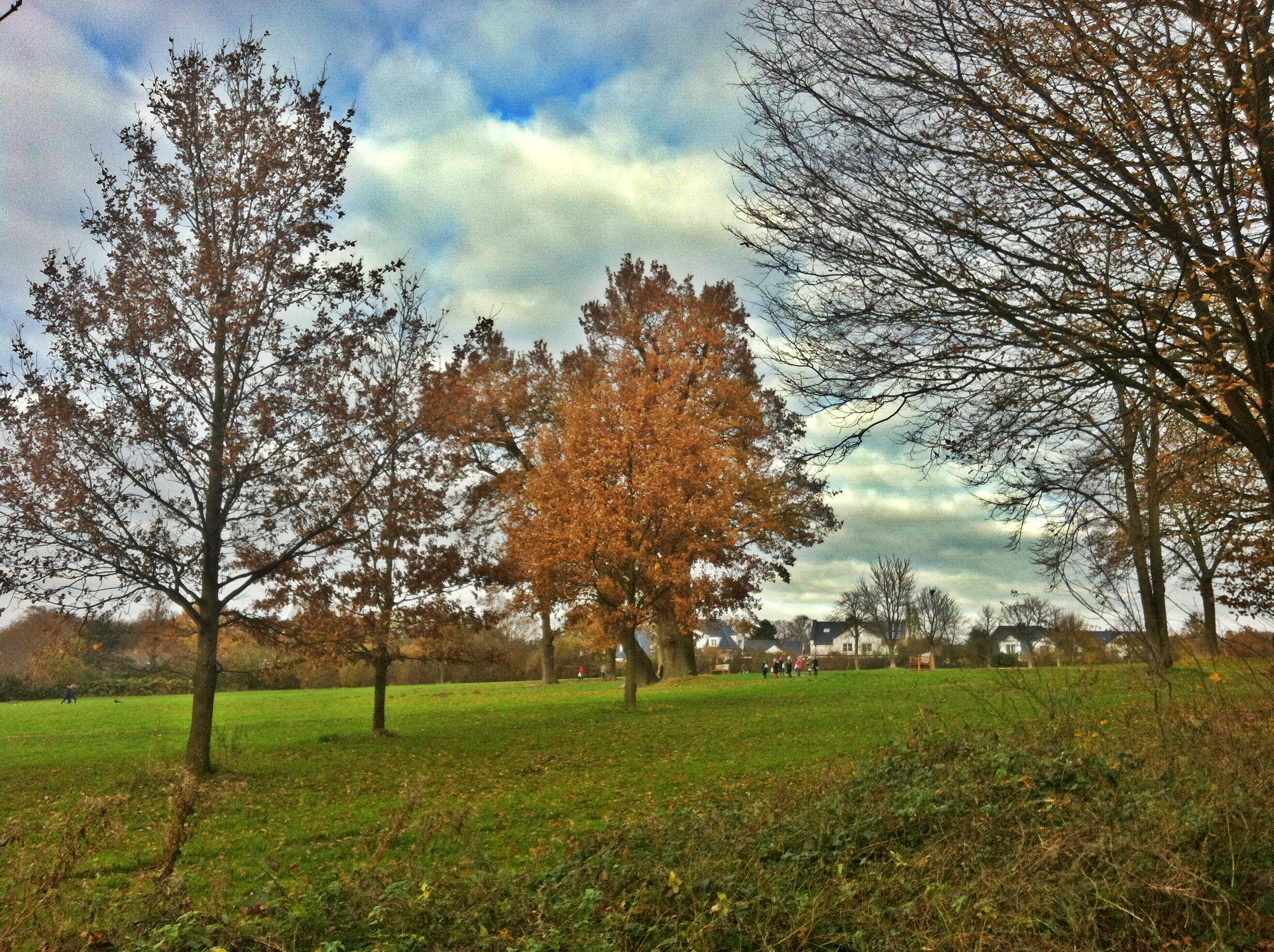 Nienstedten, Hamburg, Germany